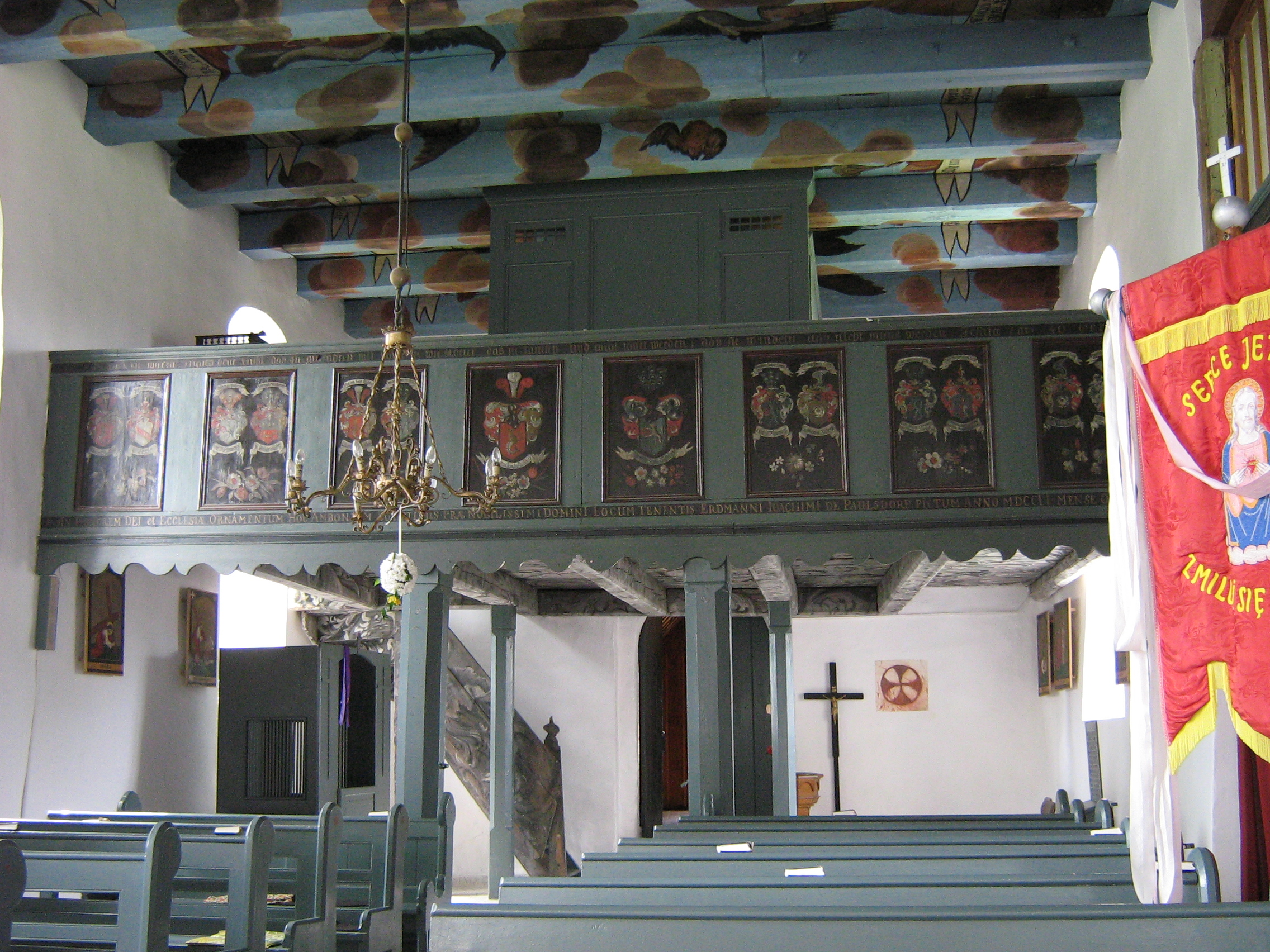 Empora w Kościele Matki Boskiej Częstochowskiej w Koniewie. Widoczne są polichromie olejne.